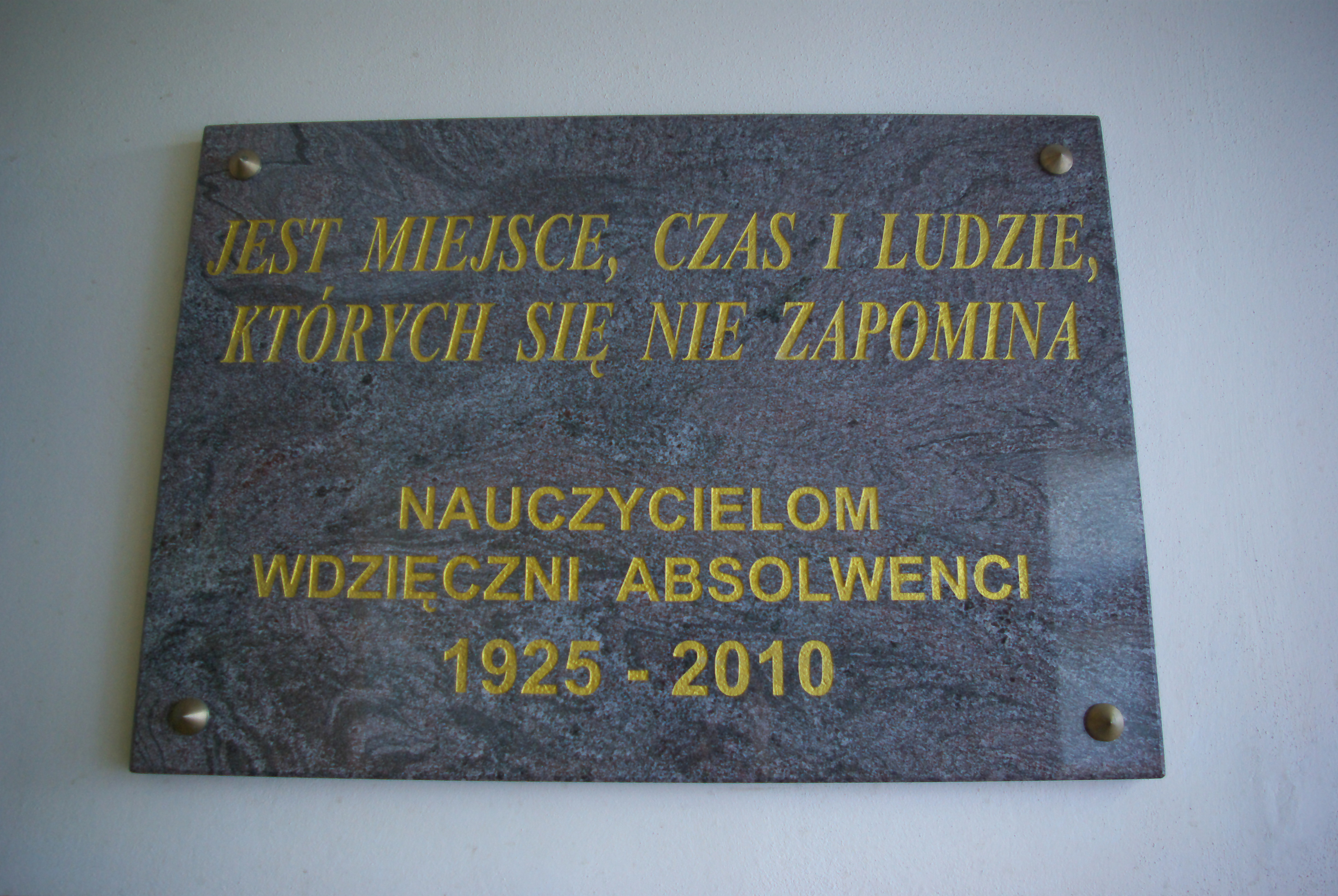 Zespół Szkół nr 1 im. Karola Adamieckiego w Sanoku. Tablica pamiątkowa